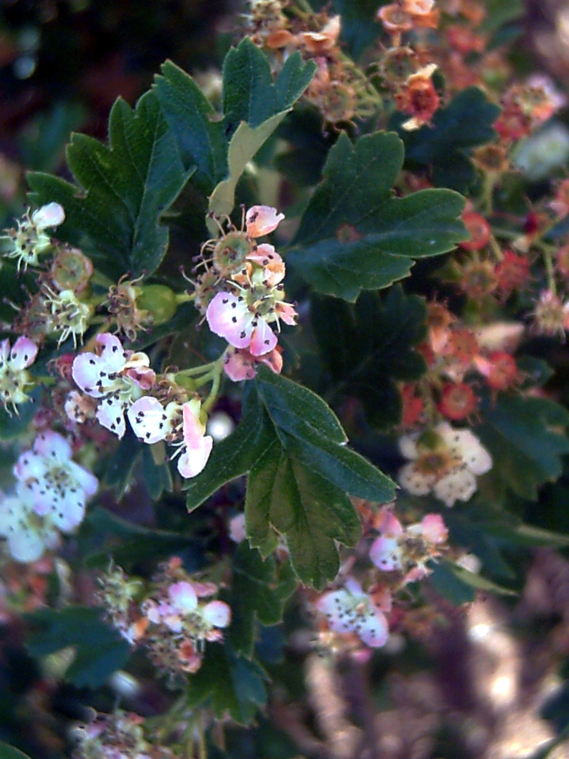 Crataegus monogyna Dehesa Boyal de Puertollano